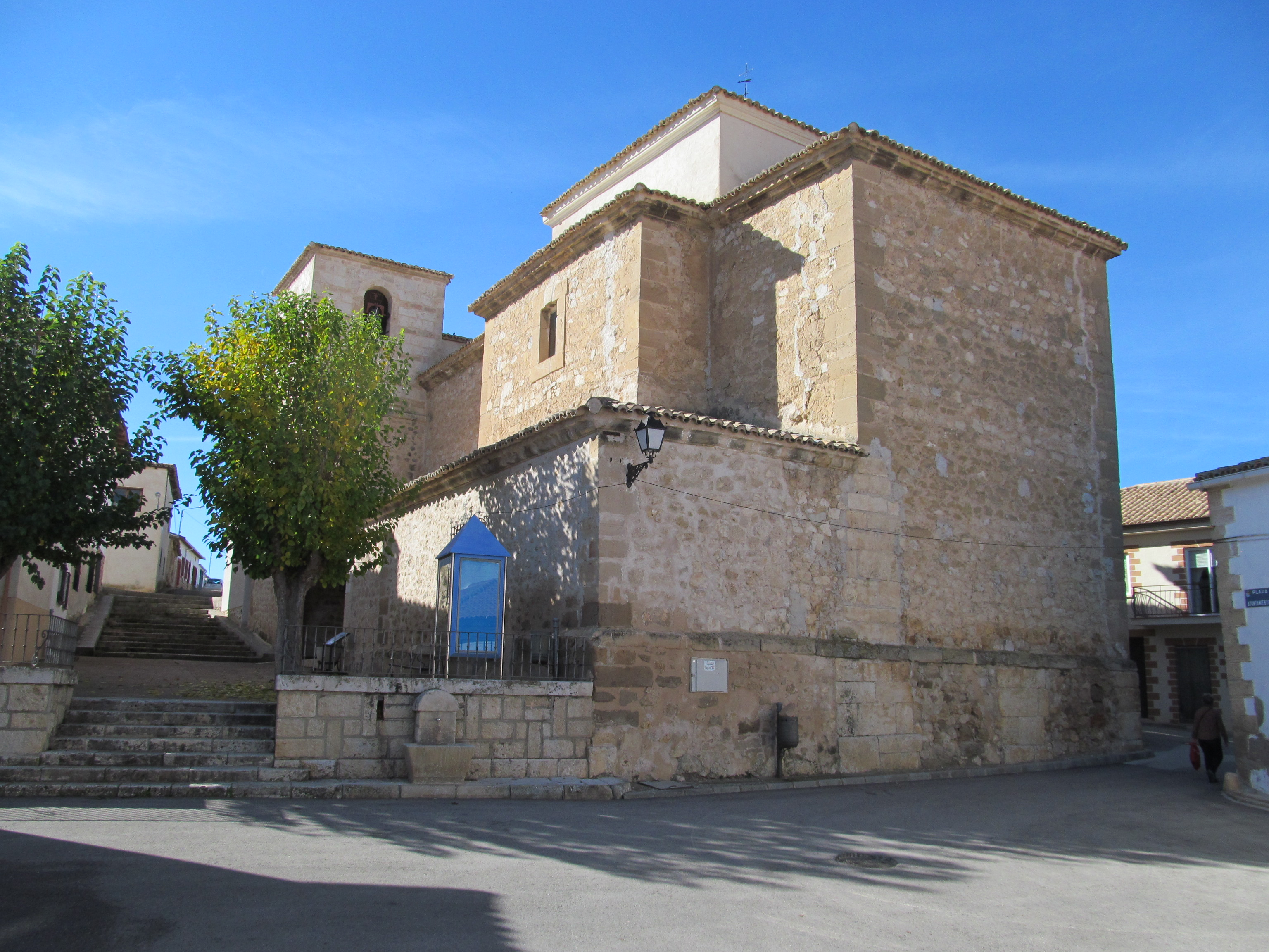 Sayatón-Iglesia de San Pedro, su construcción data del siglo XVII.